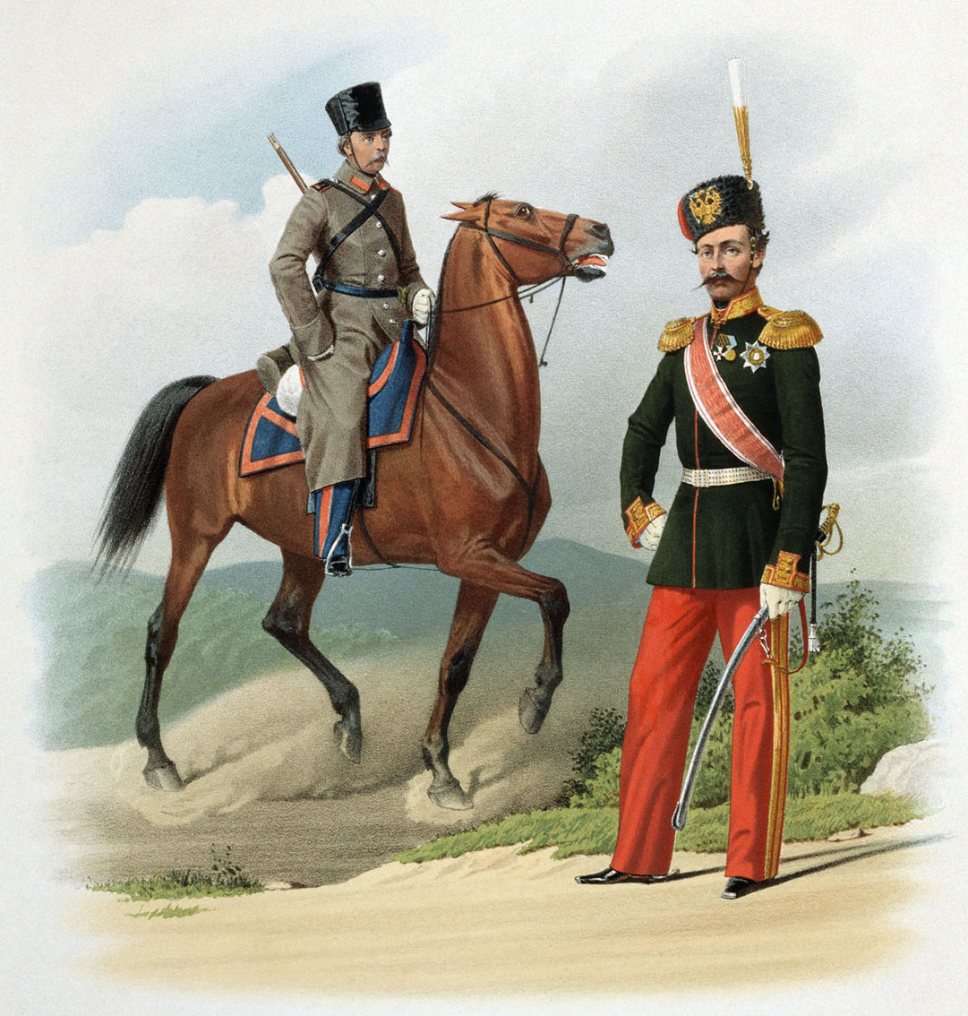 Урядник и Генерал Доского Войска, 30 мая 1862. (В обыкновенной походной и в городской праздничной форме).